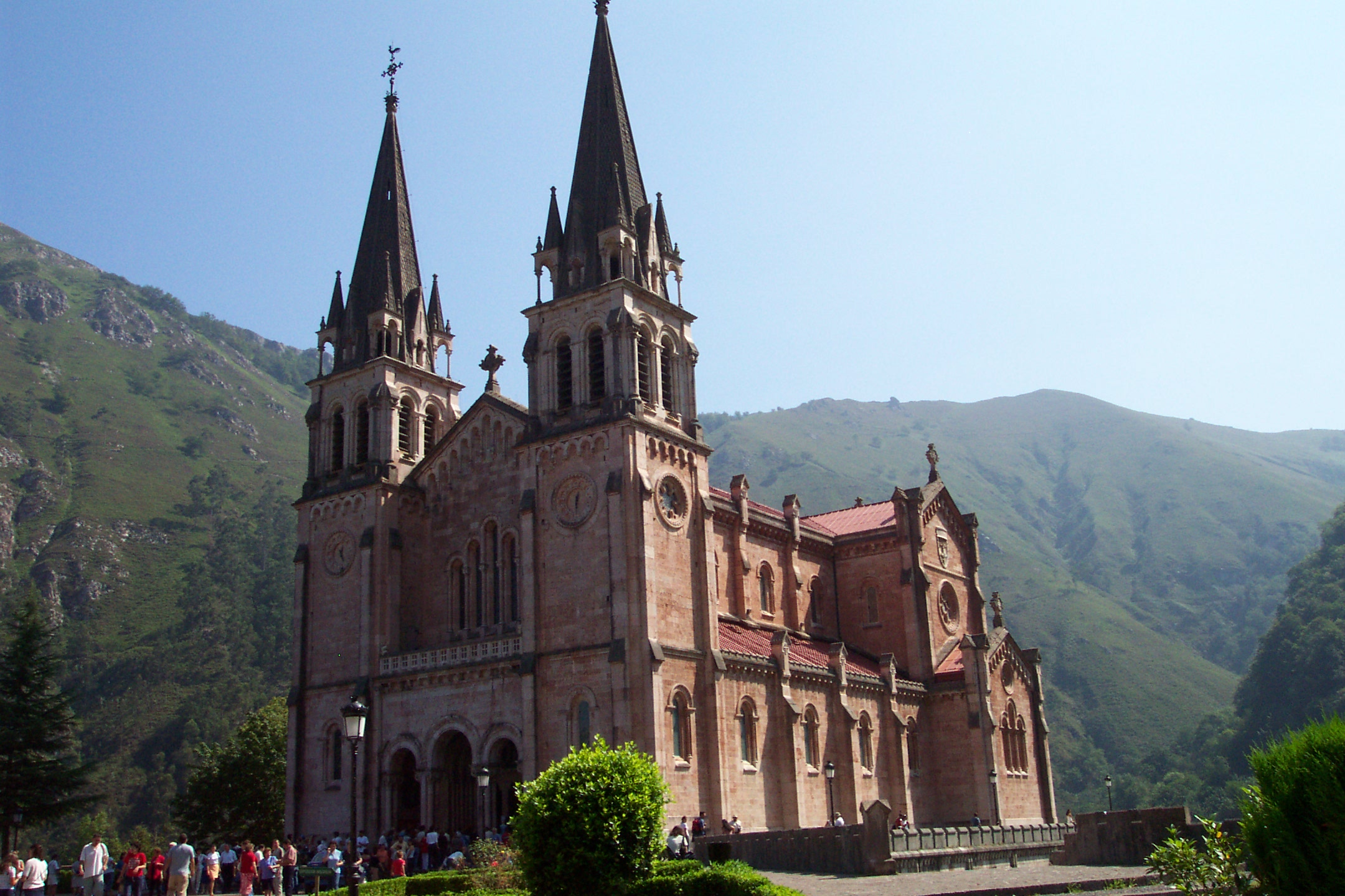 Monasterio de Covadonga